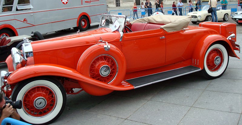 1932 Stutz SV-16 roadster by Derham